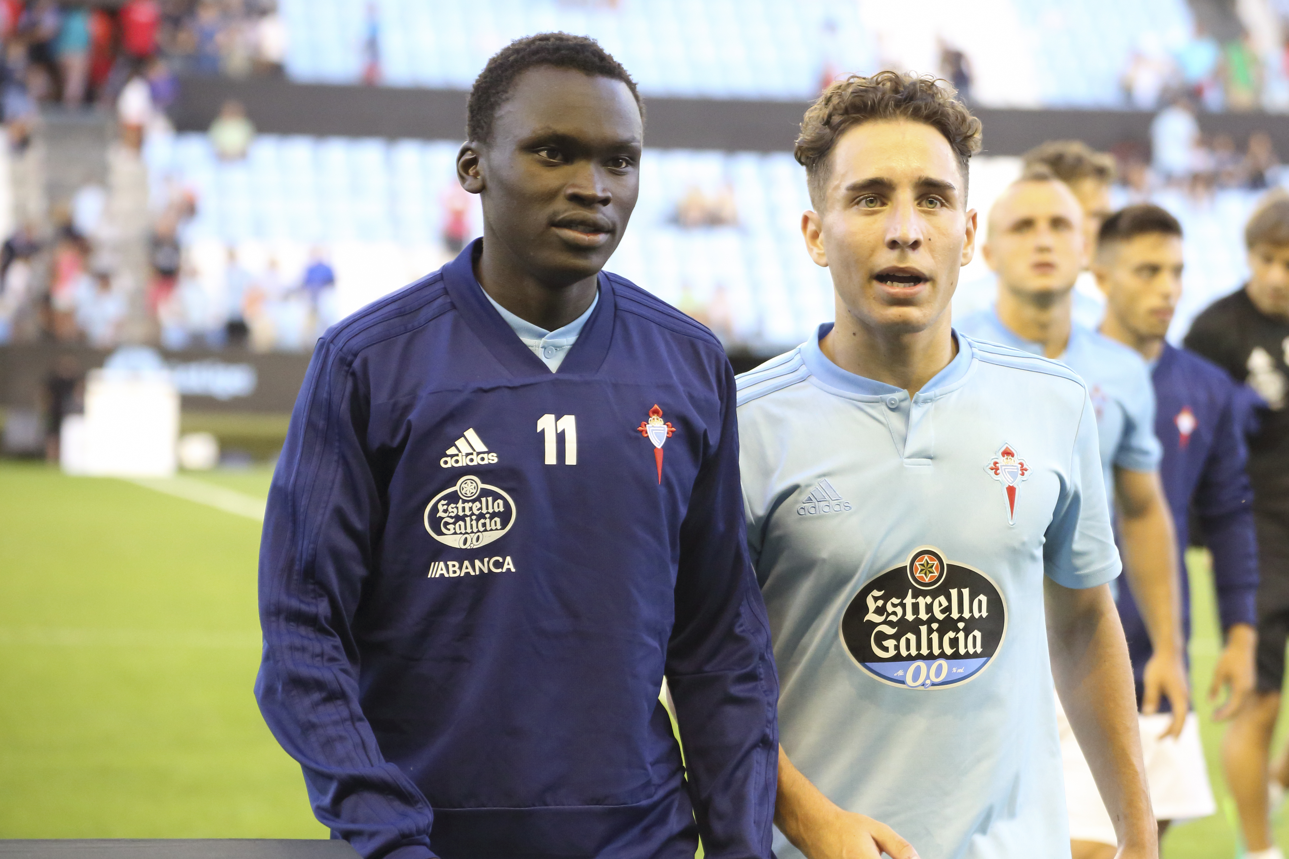 Partido disputado en los aledaños del Estadio de Balaidos, siendo el partido de presentación para el Celta ante su afición para la temporada 2018/2019